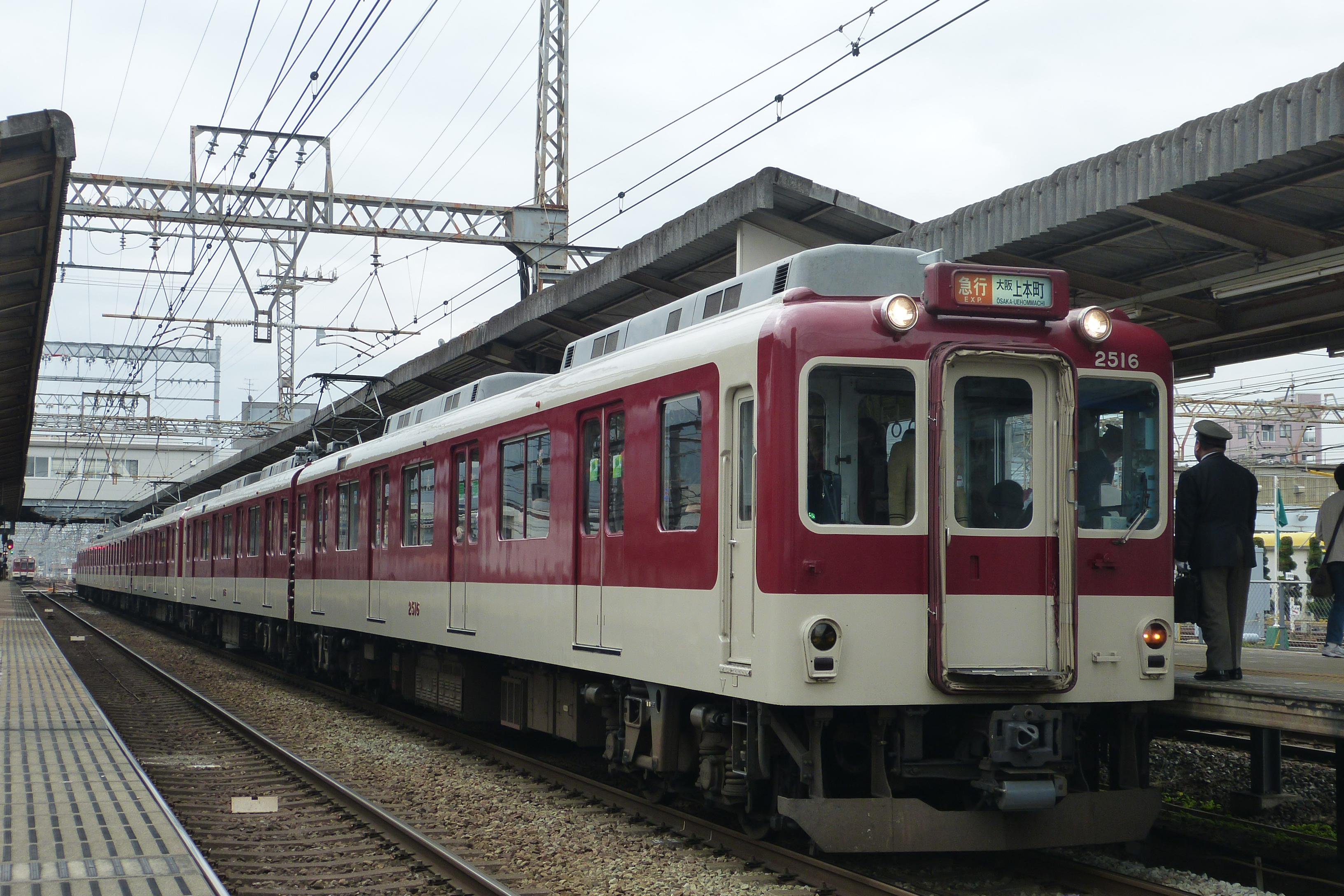 2012年11月10日のきんてつ鉄道まつりに伴い急行が臨時停車。前2両、後4両は共に2410系。